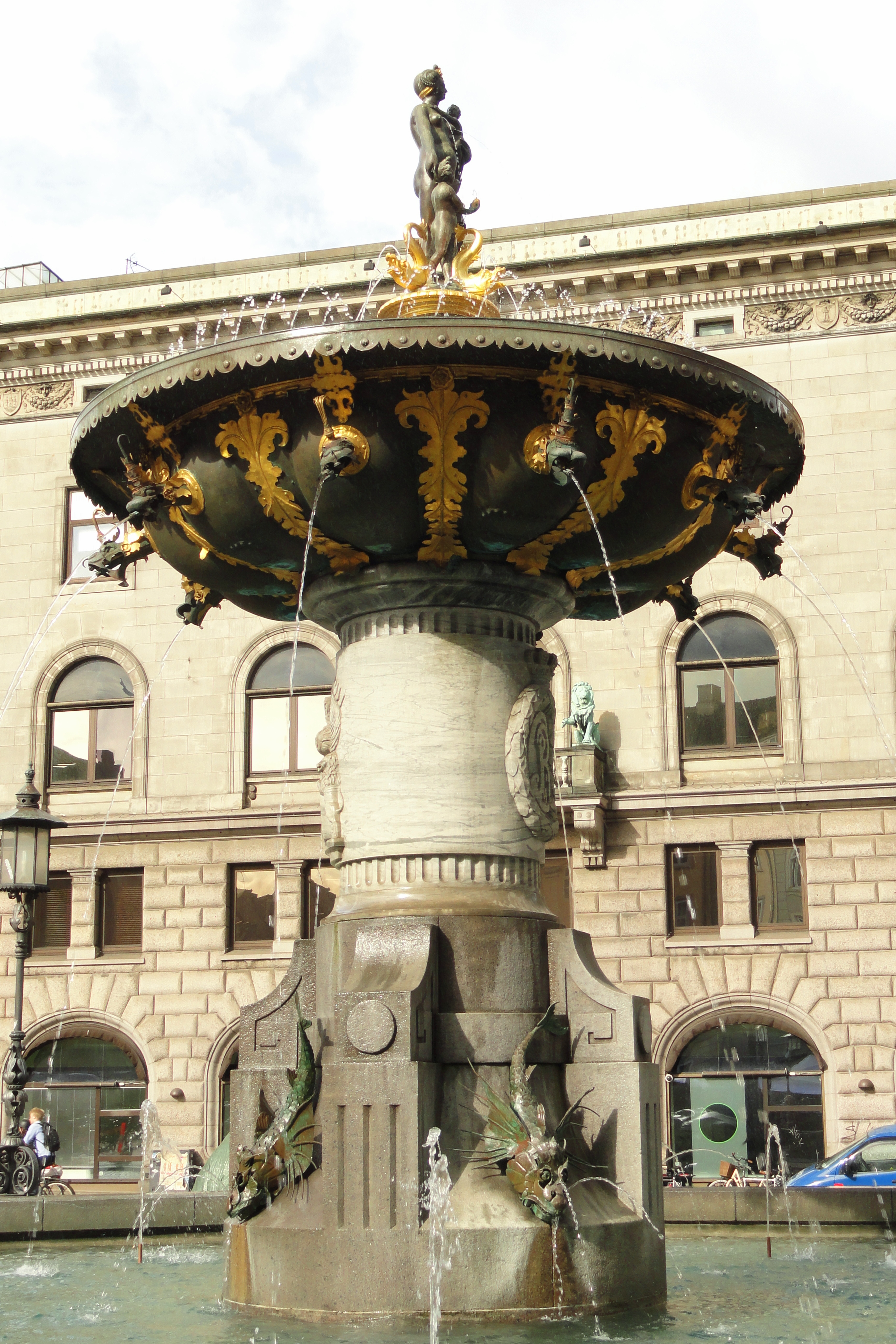 Caritas Well, Copenhagen, Denmark.